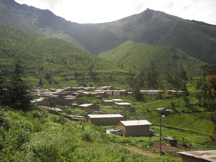 El Distrito de Quinocay conformado por dos pueblos (San Pedro de Quinocay y San Juan de Viscas) se ubica en la zona nor oeste de la Provincia de Yauyos a 2650 msnm aproximadamente, en Lima. -Ruta 1: Mala, Calango, Pongo, Viscas, desvio a Quinocay. -Ruta 2: Asia, Omas, Pilas, Tamará, Tres cruces, desvio a Quinocay.